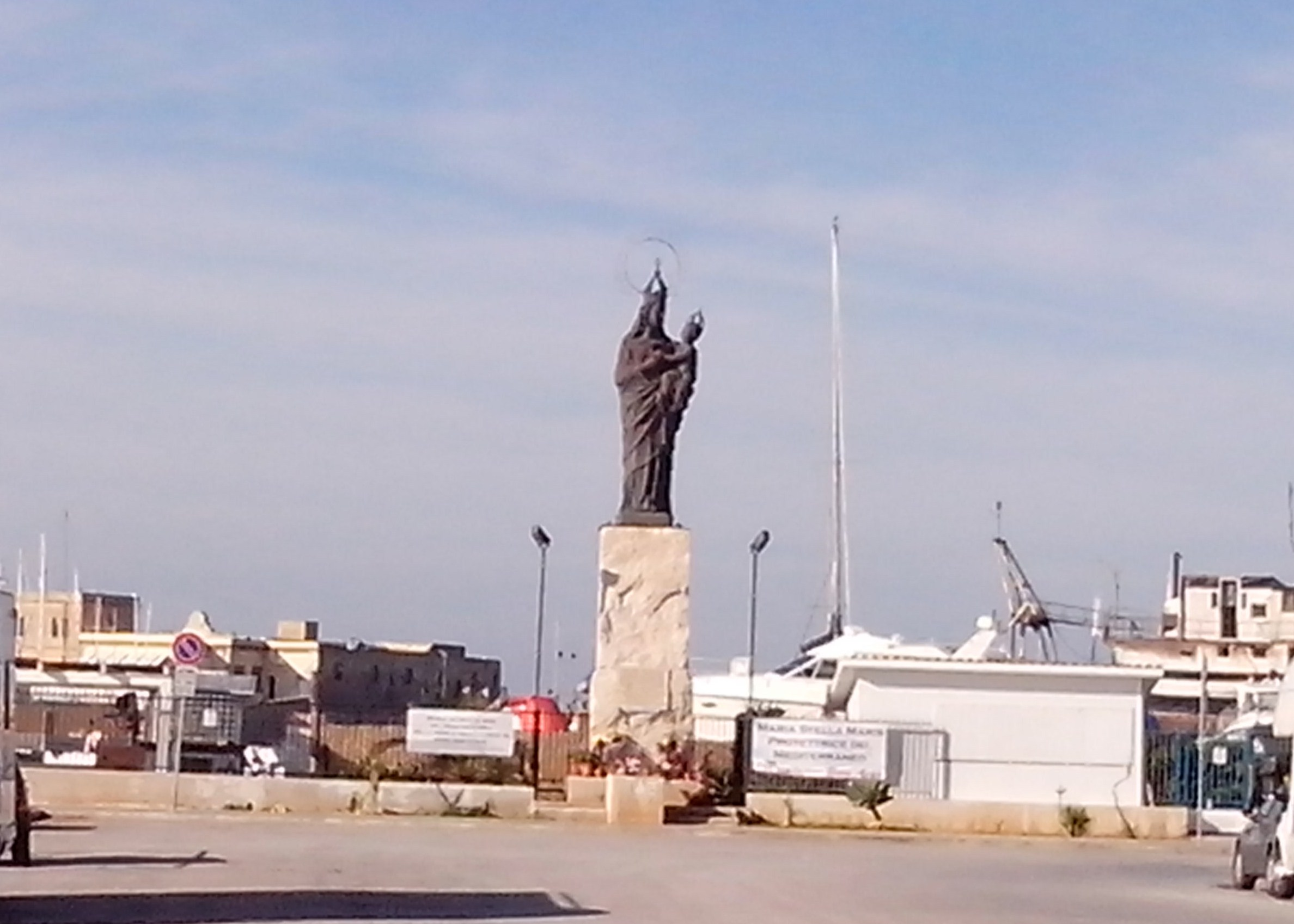 Statua in bronzo della Madonna di Trapani, opera di Mario Ferretti del 1961. Trapani, porto